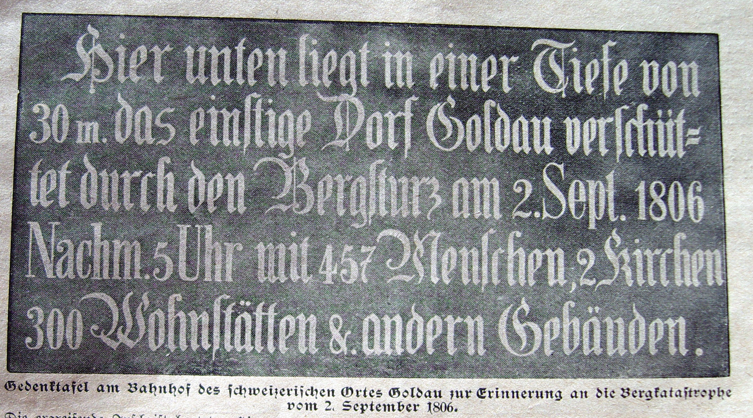 Gedänkdafele am Bahnhof vo Goldau an dr Bärgsturz im Johr 1806